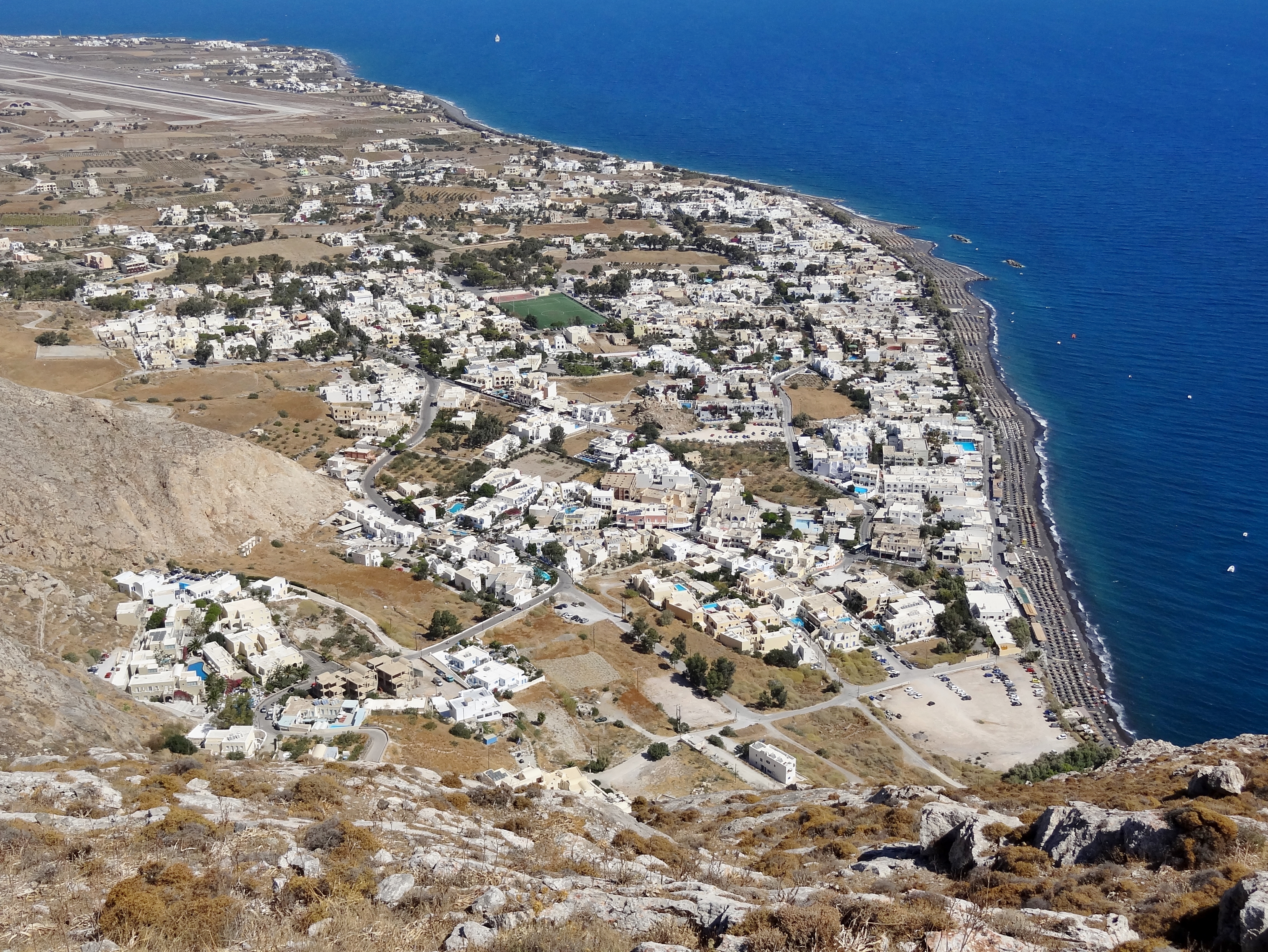 Kamari (Καμάρι), Santorin (Thera), Kykladen, Griechenland